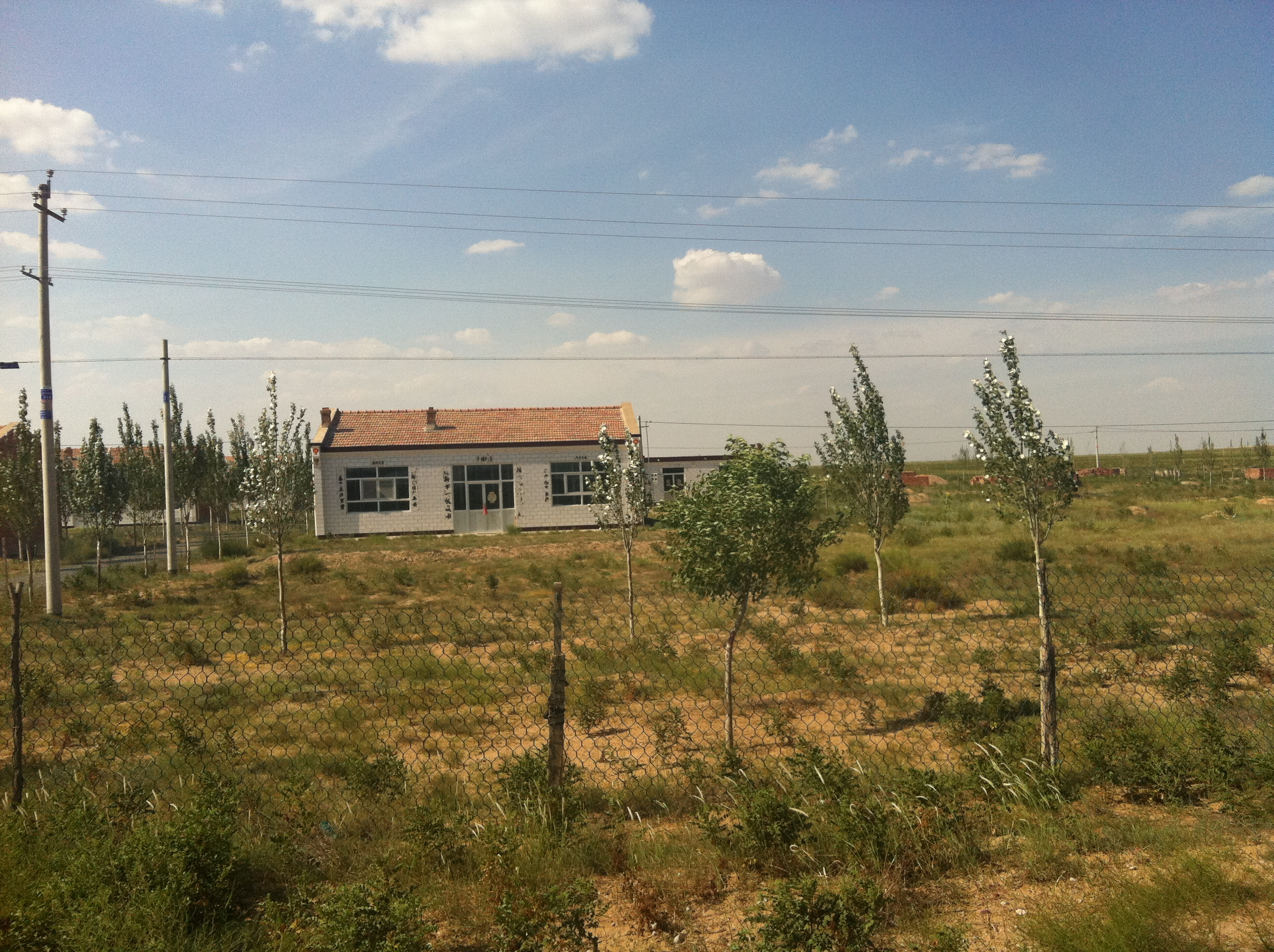 Yanchi, Wuzhong, Ningxia, China